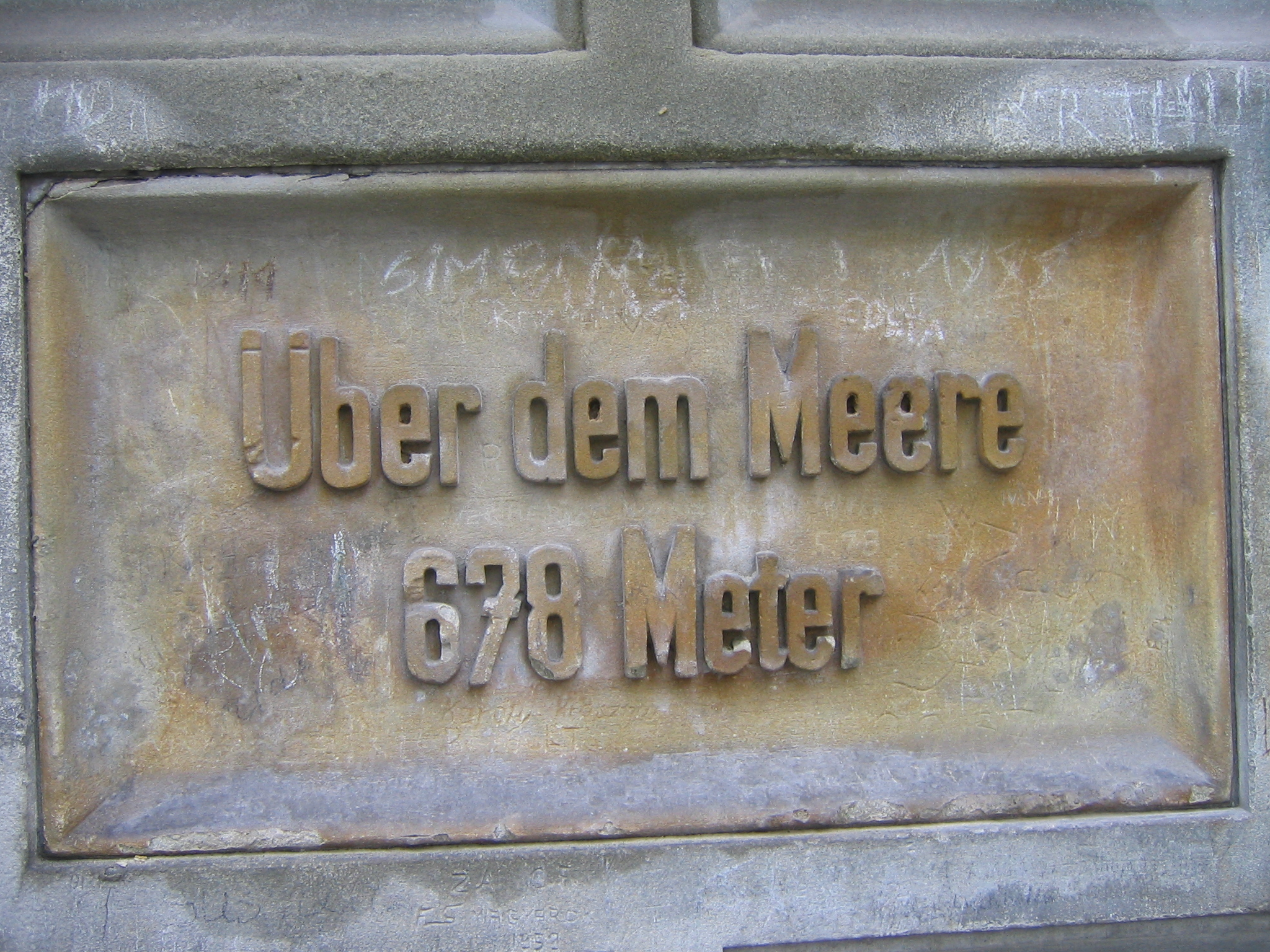 Donauquelle in Donaueschingen